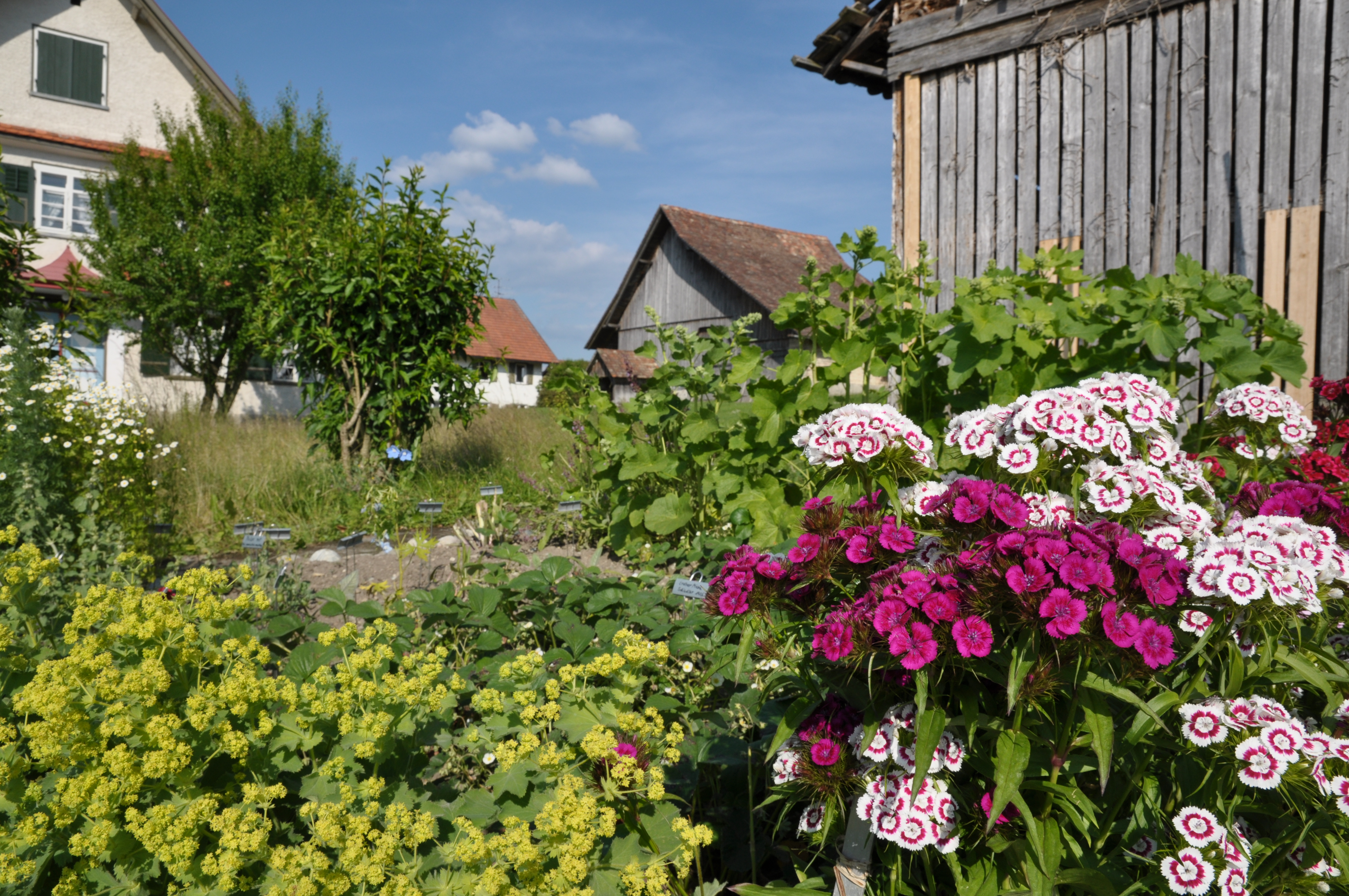 Hofanlage Milz, Bauerngarten, Haupthaus, Scheune, Remise, Kressbronn-Retterschen